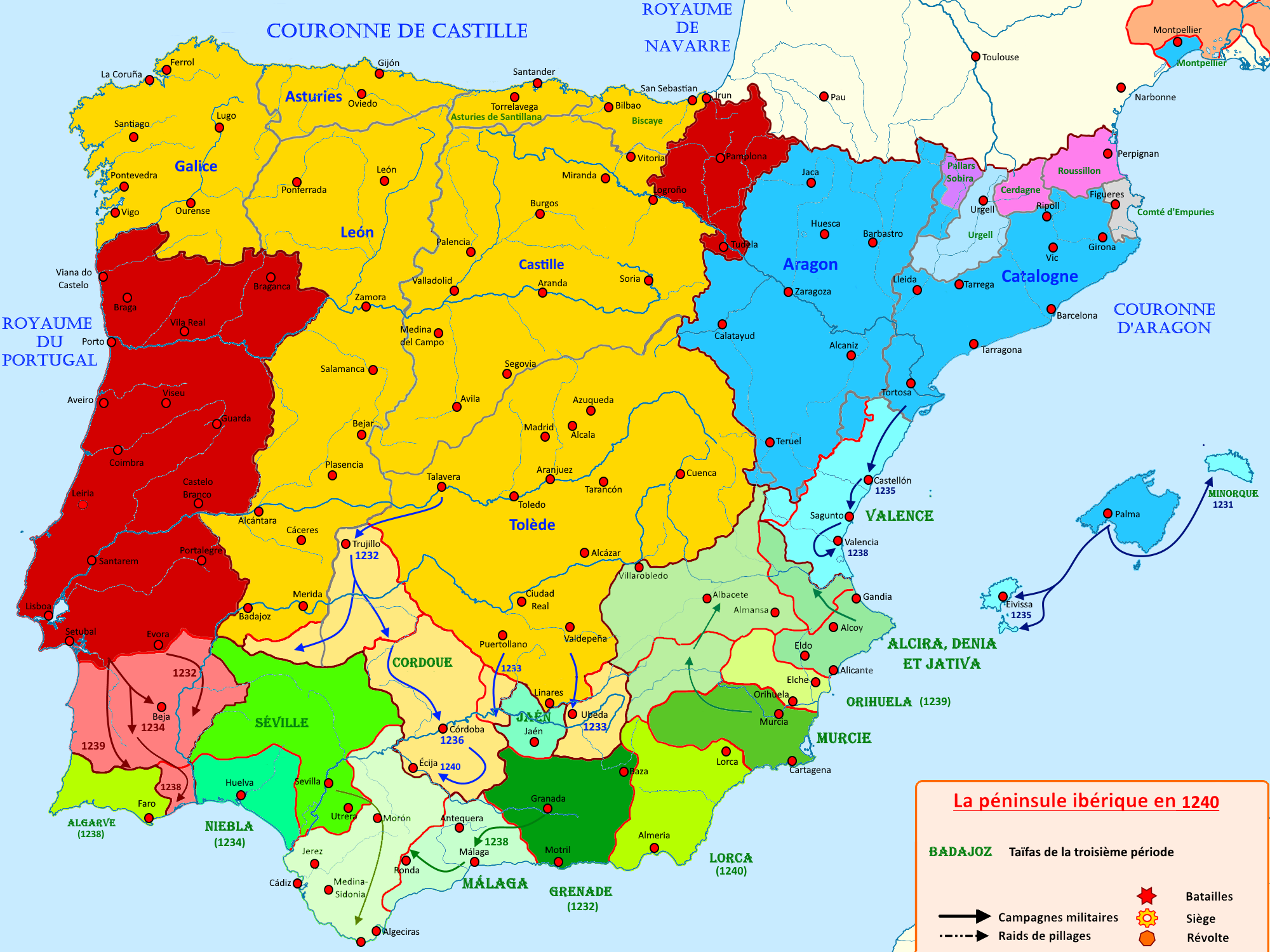 Carte de la péninsule ibérique en 1240 illustrant les principaux évènements de la période